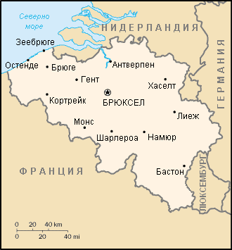 Карта на Белгия - от en